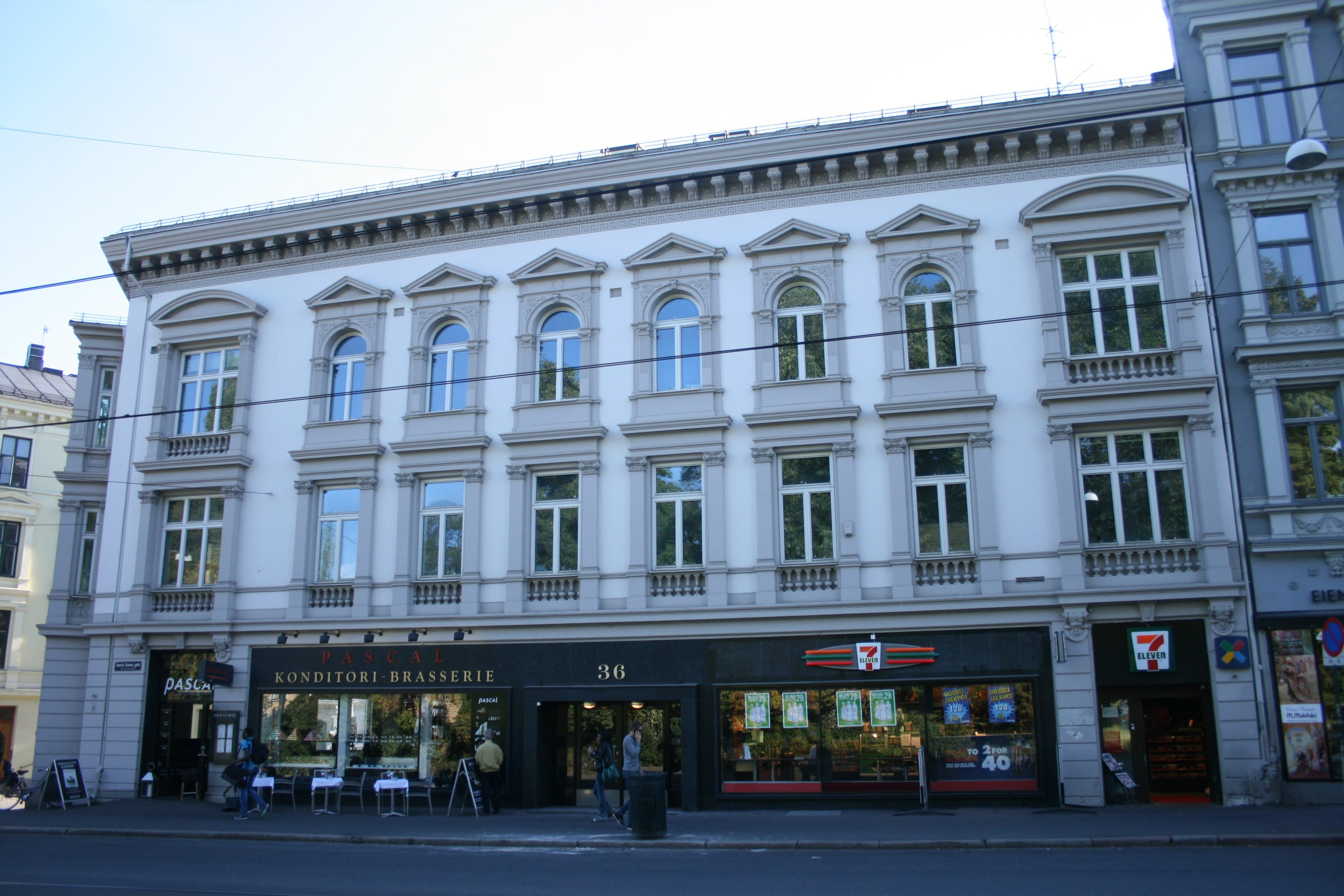 Henrik Ibsens gate 36, Oslo. Bygård fra 1877, oppført for Peter Petersen, ark. August Tidemand. Opprinnelig Huitfeldts gate 1, senere Drammensveien 10. Hjørnekarnapp fra 1890. Ny butikkfasade mot Drammensveien i 1946. Fra 1900 Parkkafeen, under okkupasjonen tysk restaurant. Nå Pascal Konditori og Brasserie.